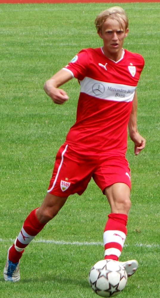 Michael Vitzthum beim Testspiel gegen den TSV Affalterbach. Aufgenommen von